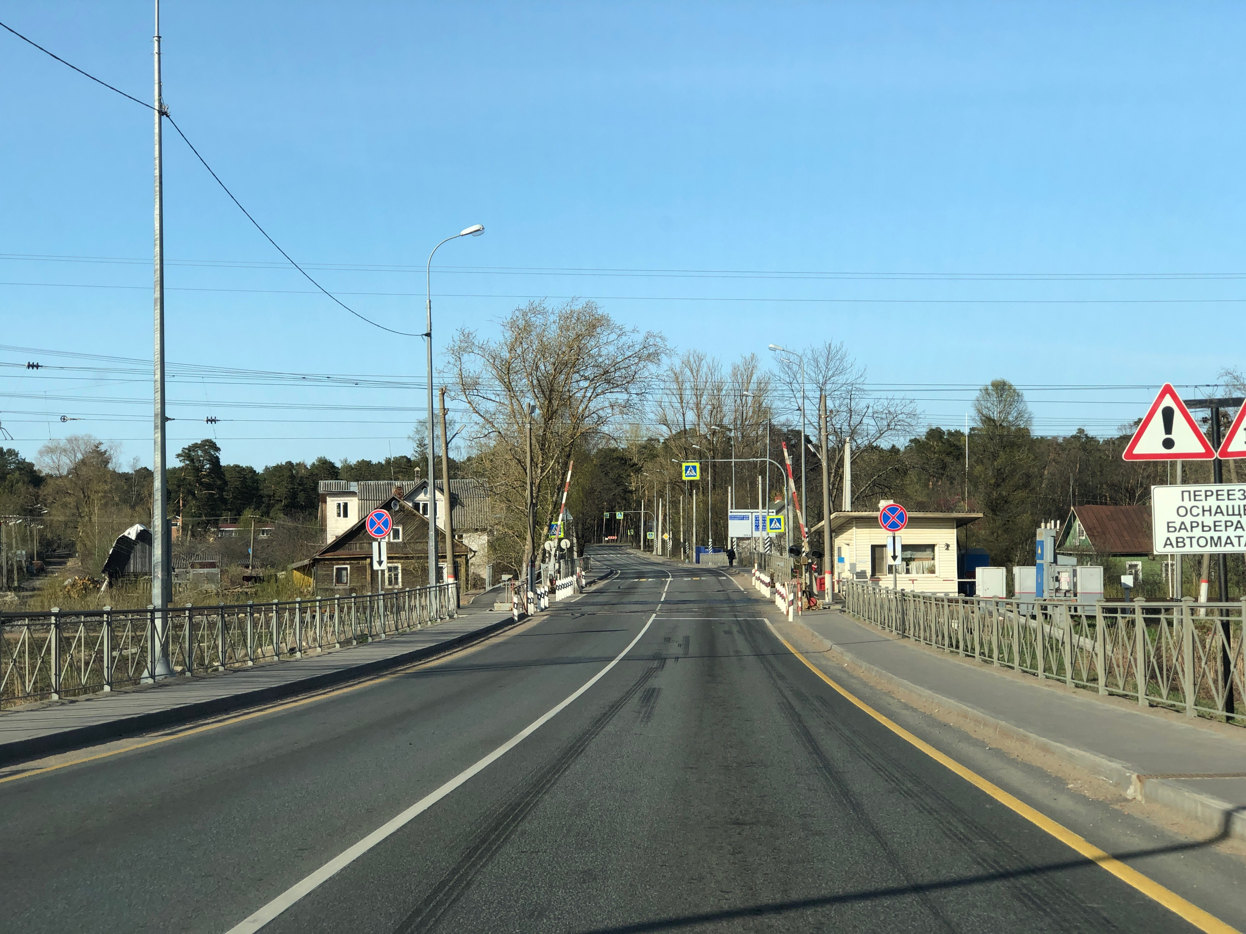 Переезд в Большой Ижоре